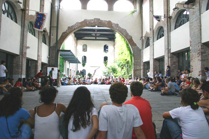 Visione dell'entrata dell'Arsenale della Pace di Torino, sede del Sermig